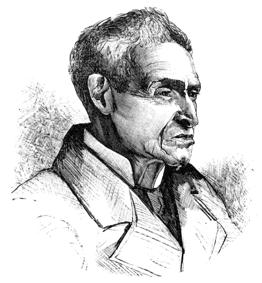 Gravure parue dans le périodique colombien "Papel Periódico Ilustrado" (1881-1887)